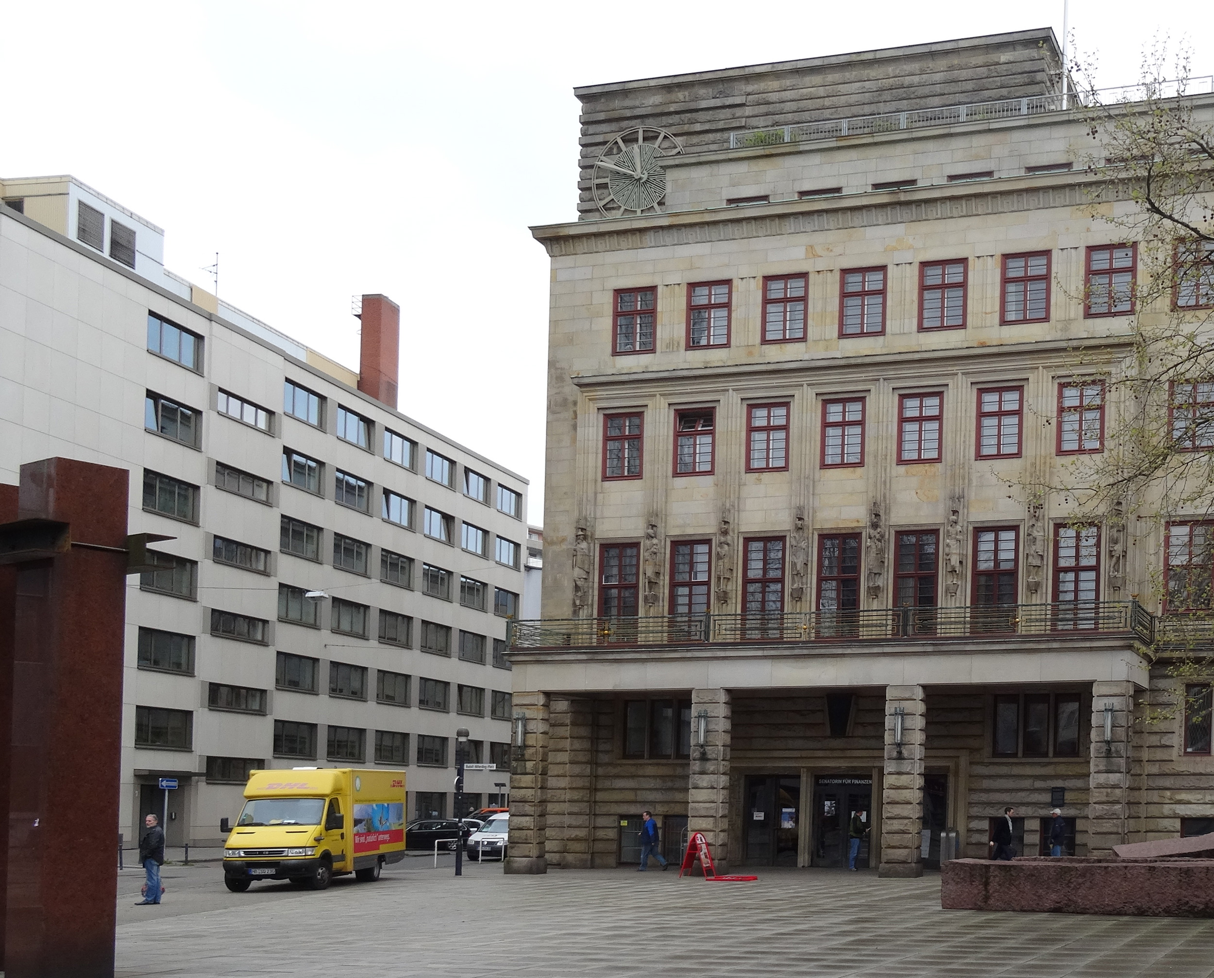 Infotafel: Haus des Reichs, Rudolf-Hilferding-Platz 1